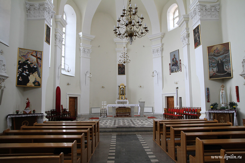 Гродна. Інтэр'ер брыгіцкага касцёла